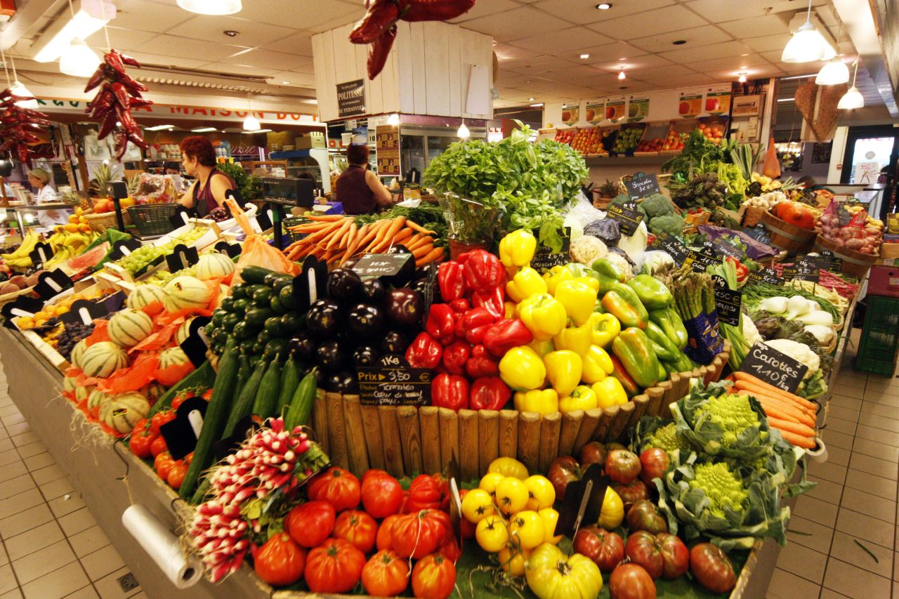 Étal de fruits et légumes aux halles d'Avignon